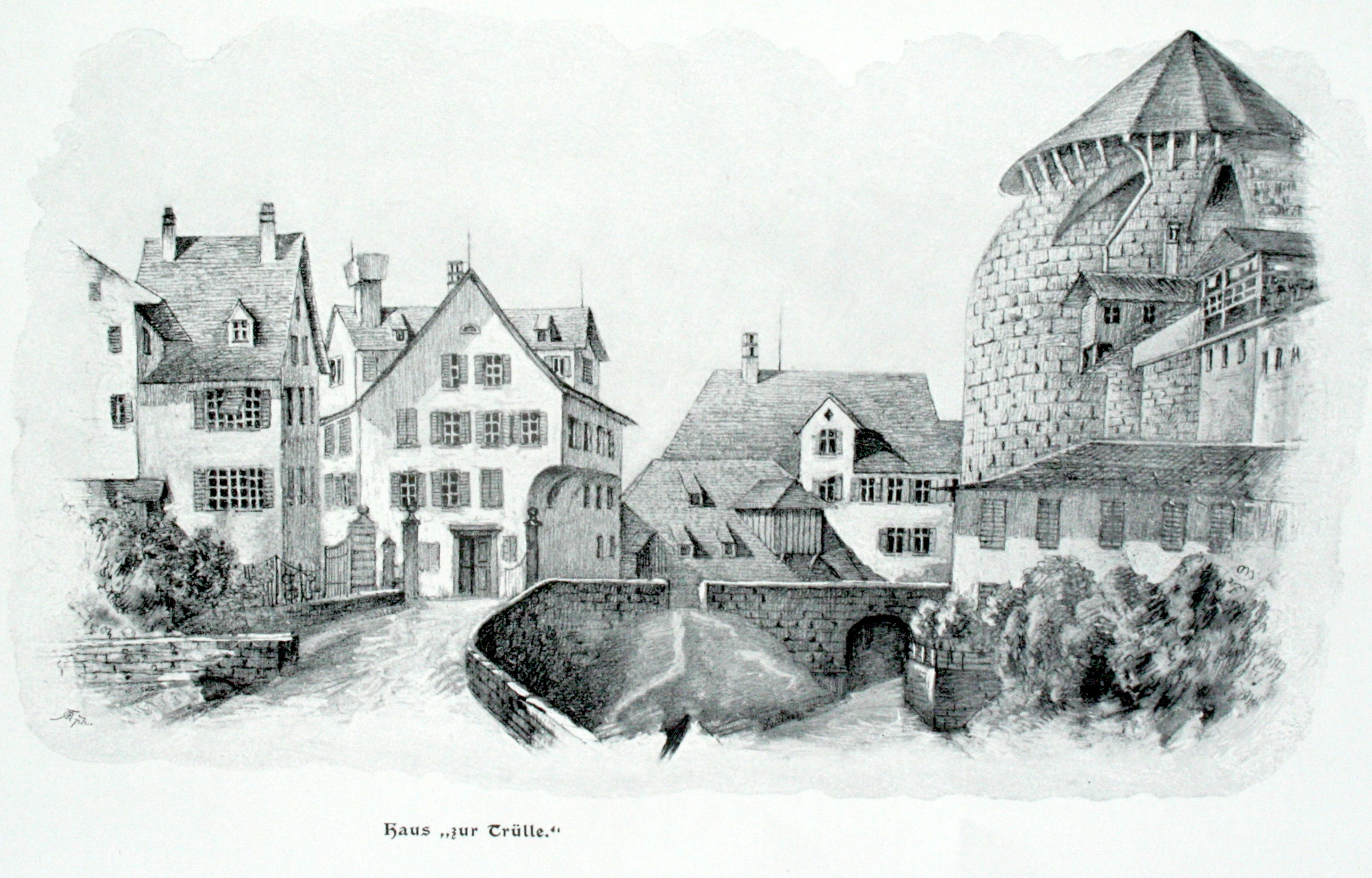 Haus zur Trülle am Fröschengraben, rechts das Rennwegbollwerk; Ansicht von Süden